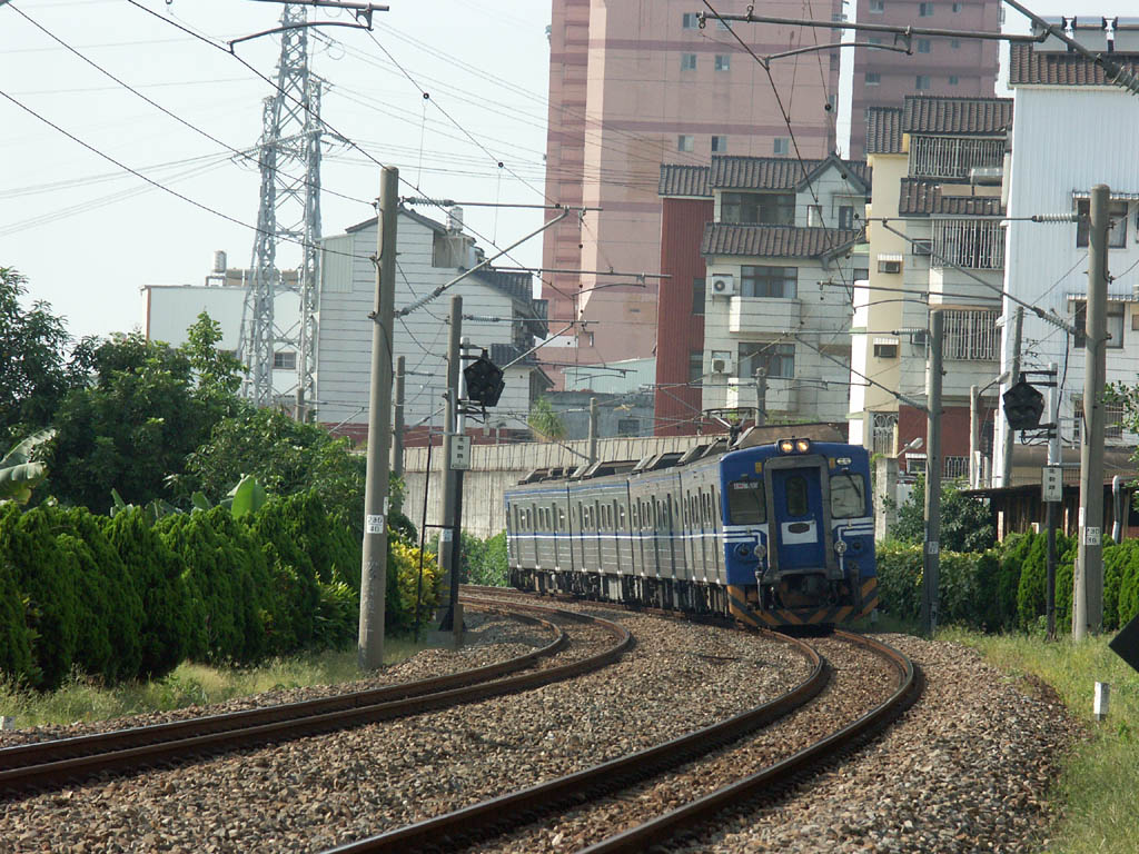 臺灣鐵路管理局EMU500型電聯車以每4輛為1編組。